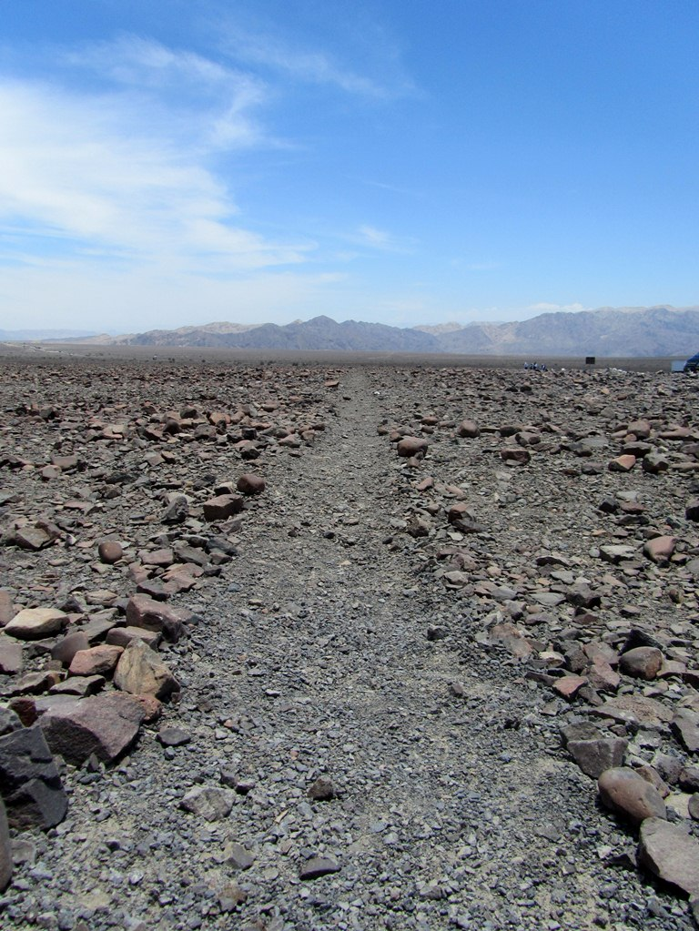 Nazca lines, Peru